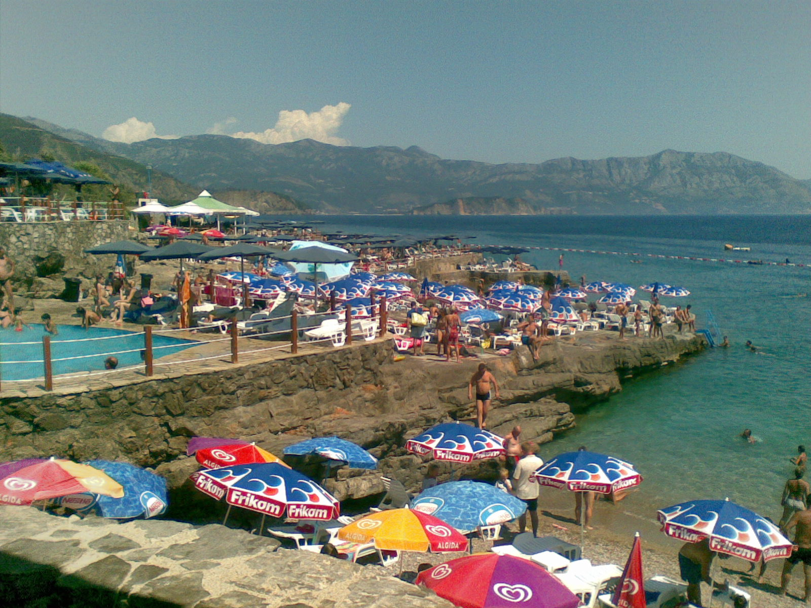 Plaza Ploce 2009